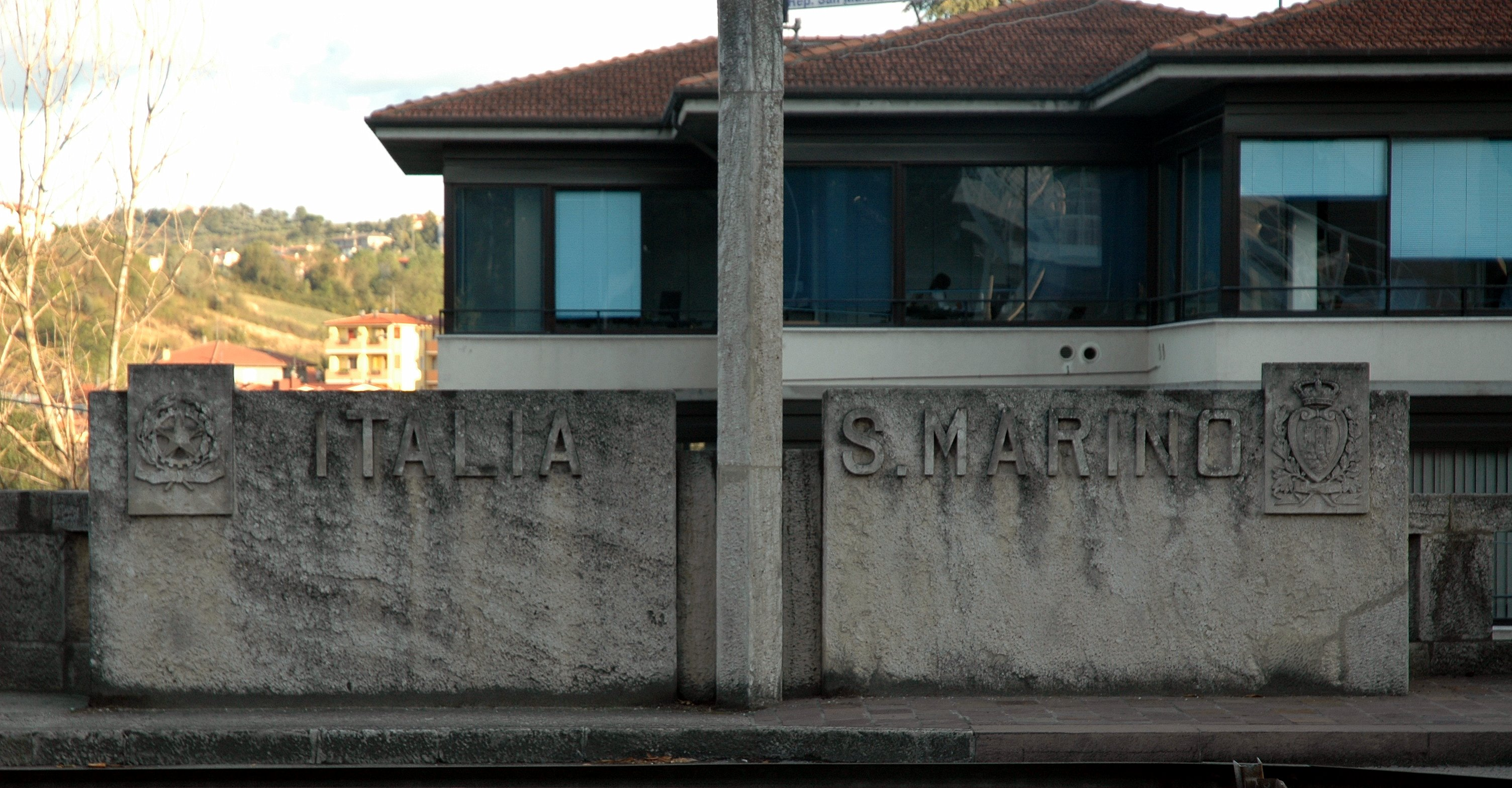 Dogana (San Marino): granica państwowa z Włochamidroga numer SS72: San Marino - Via Tre Settembre Italy - Strada Statale Consolare Rimini San Marino